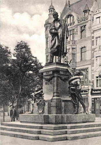 Moltkedenkmal in Düsseldorf, geschaffen im Jahre 1901 von Josef Tüshaus und Joseph Hammerschmidt, vor dem Kymly’schen Geschäftshaus an der Alleestraße 57, Ecke Stadtbrückchen, Postkarte 1906